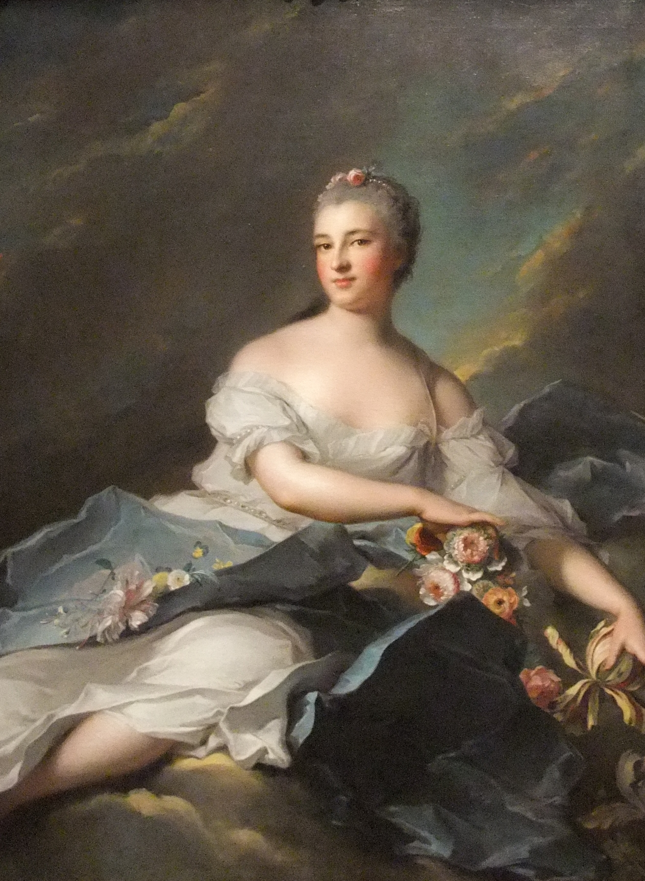 née Élisabeth d'Alencey